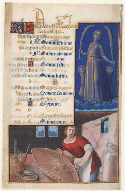 Heures Louis XII Calendrier-Août